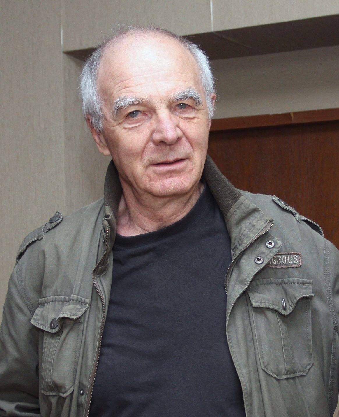 Борис Данков